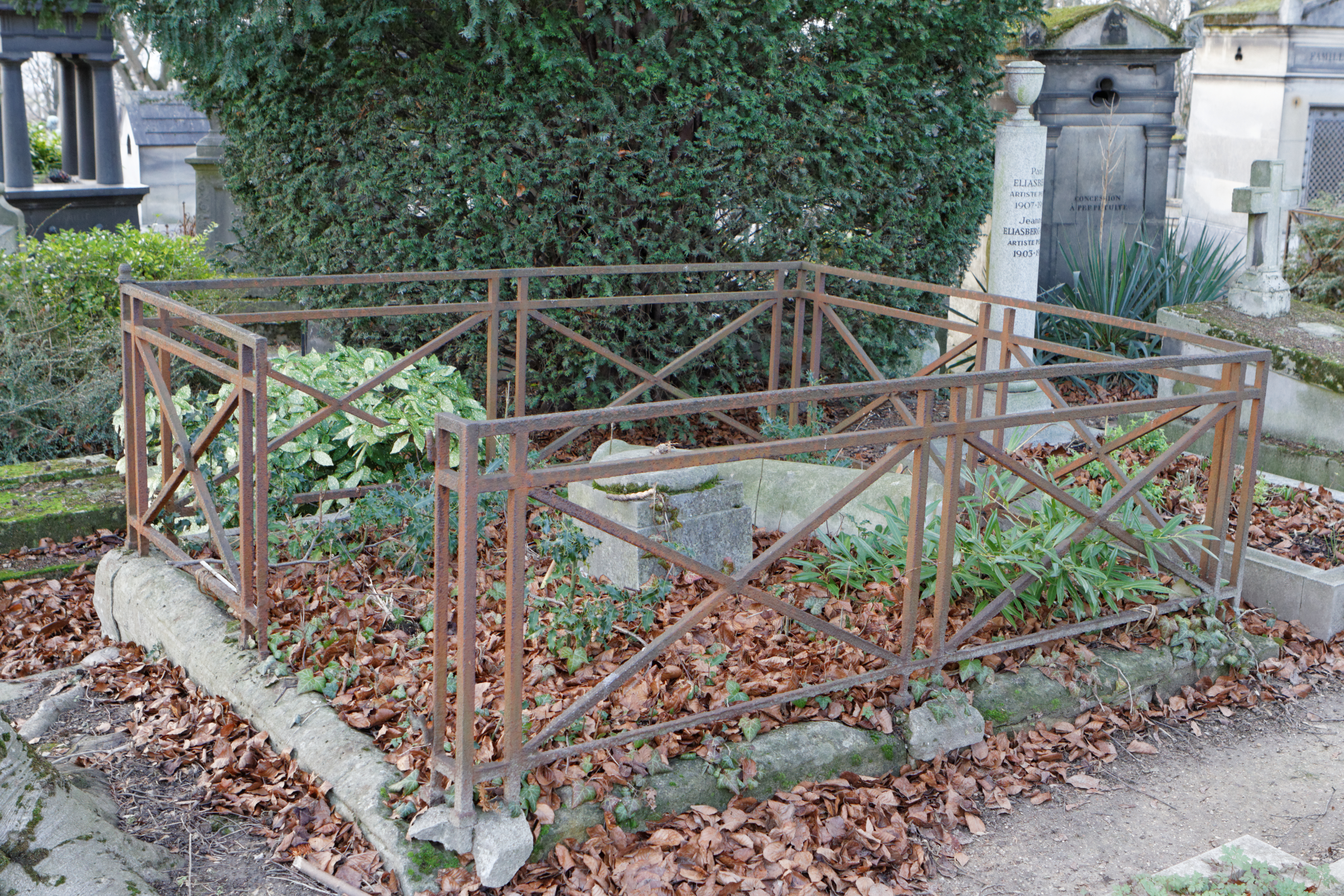 Sépulture de Tortoni, propriétaire du Café Tortoni de Paris.